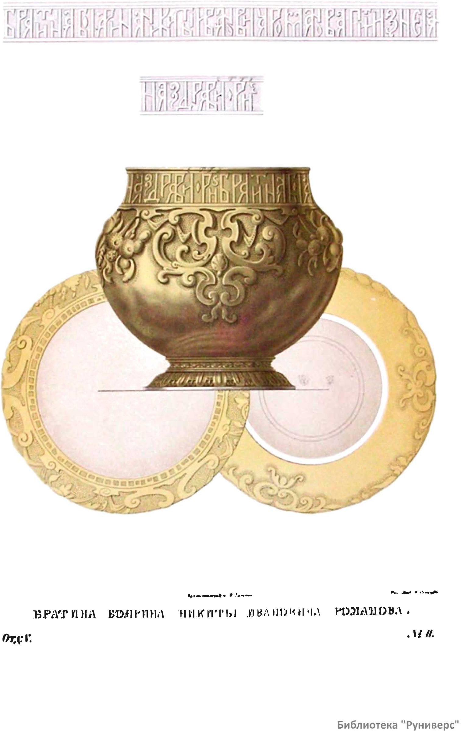 Древности Российского государства (Antiquities of Russian country), 1846—1853. Иллюстратор — Солнцев, Фёдор Григорьевич. Серебряная золоченая братина боярина Никиты Ивановича Романова. Рисунок Отд. V. № 11